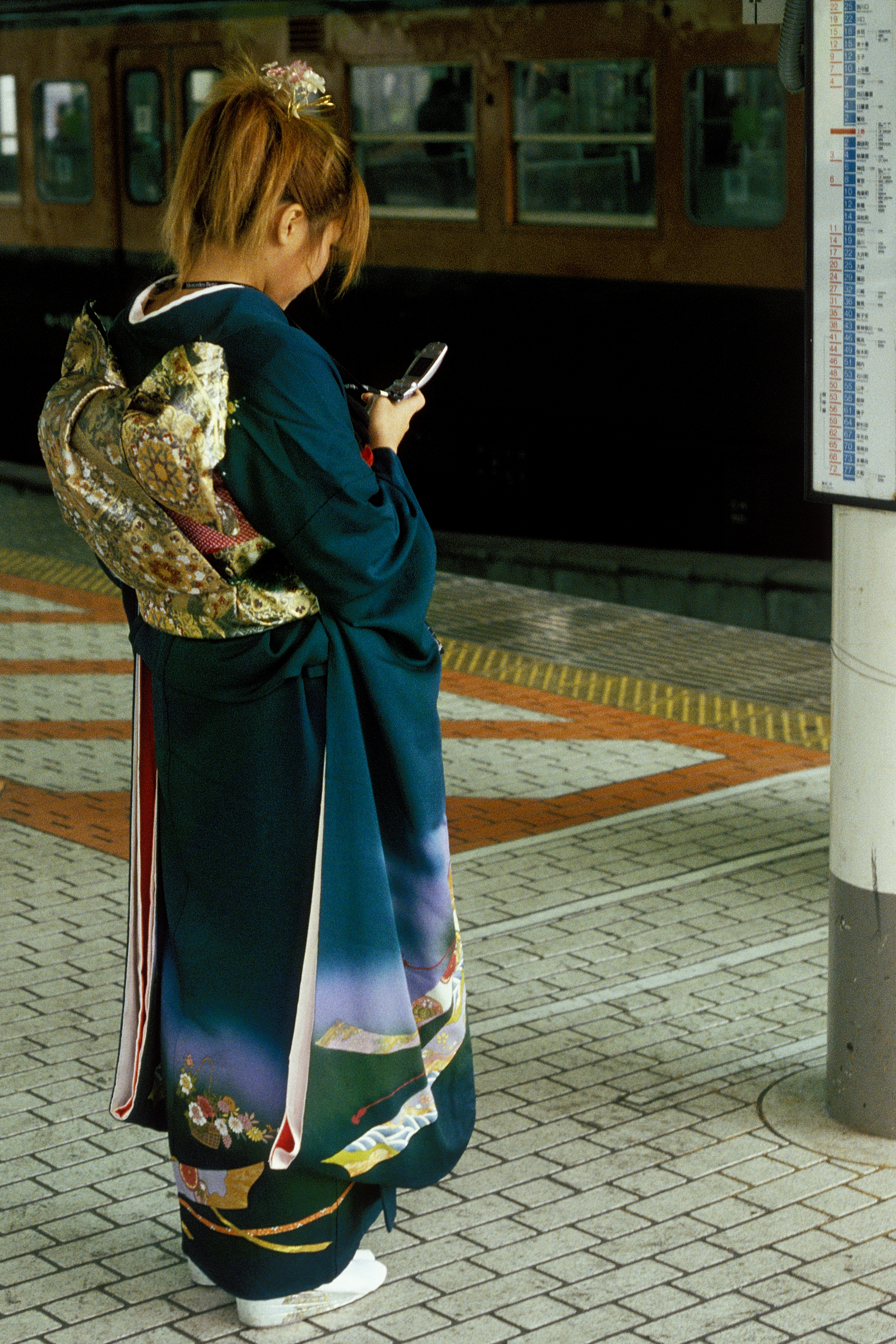 Kimono & obi (belt) photo:Ziga 19:07, 19 January 2007 (UTC)